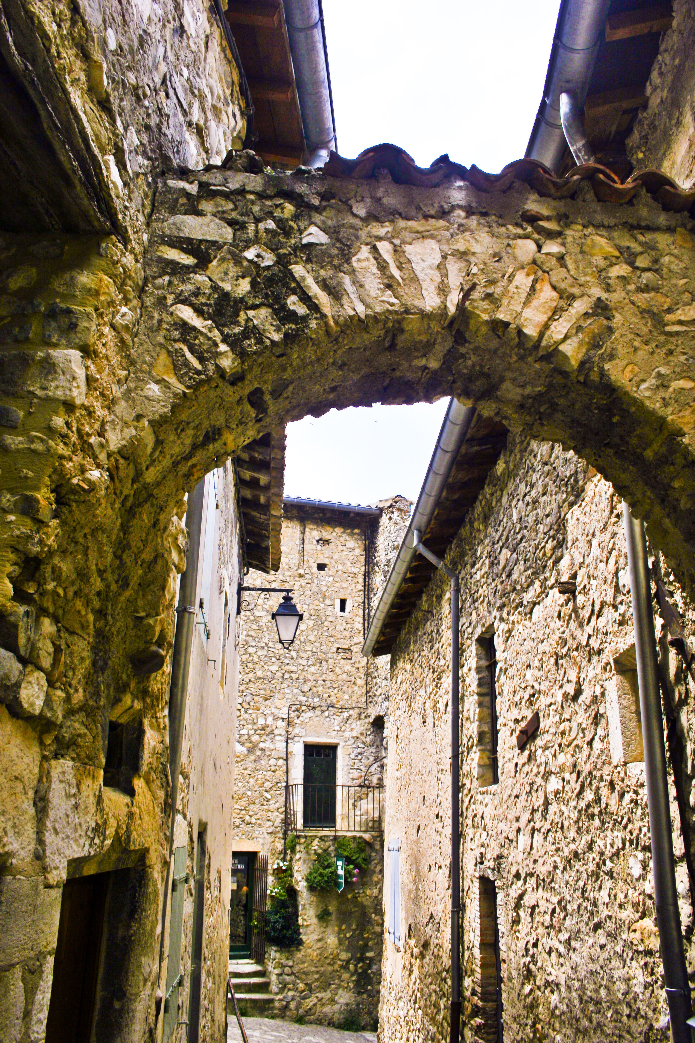 Rue de Mirmande (Drôme), France